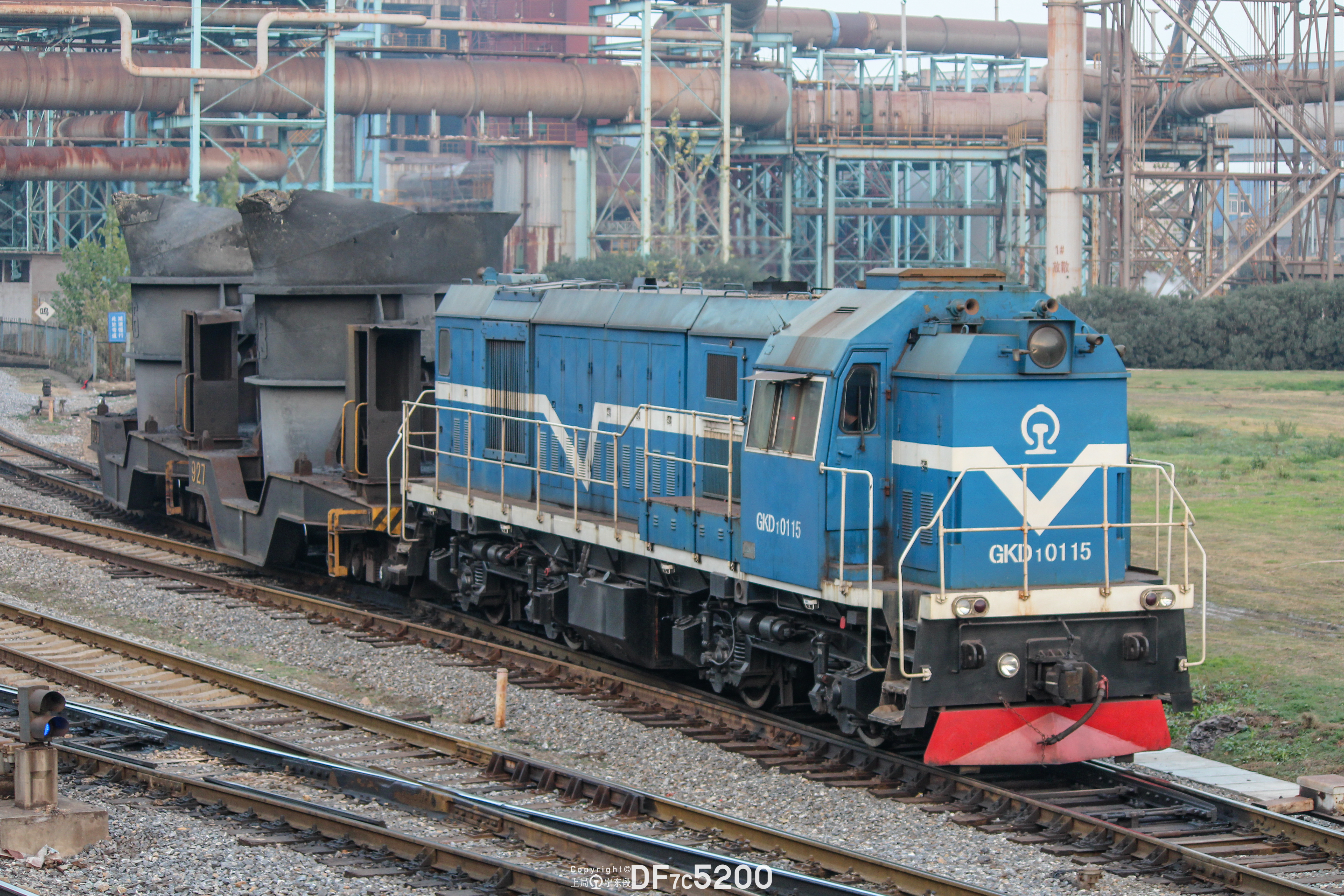 中国铁路GKD1型内燃机车